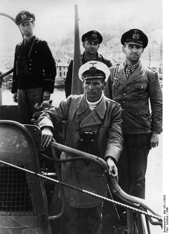 Nach erfolgreicher Feindfahrt kehrt ein U-Boot in einen norwegischen Hafen zurück. Unser Bild zeigt den Kommandanten mit Besatzungsmitgliedern des Bootes während der Einfahrt in den Hafen. PK - Schütze - Scherl KG 3.12.40 [Herausgabedatum] "Fr" OKW Norwegen. Einlaufen eines U-Bootes in den Hafen. Kommandant und Besatzungsmitglieder auf der Brücke.